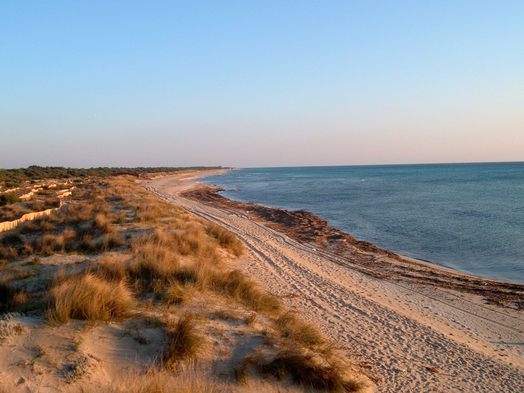 dune, litorale e posidonia, litorale di ugento